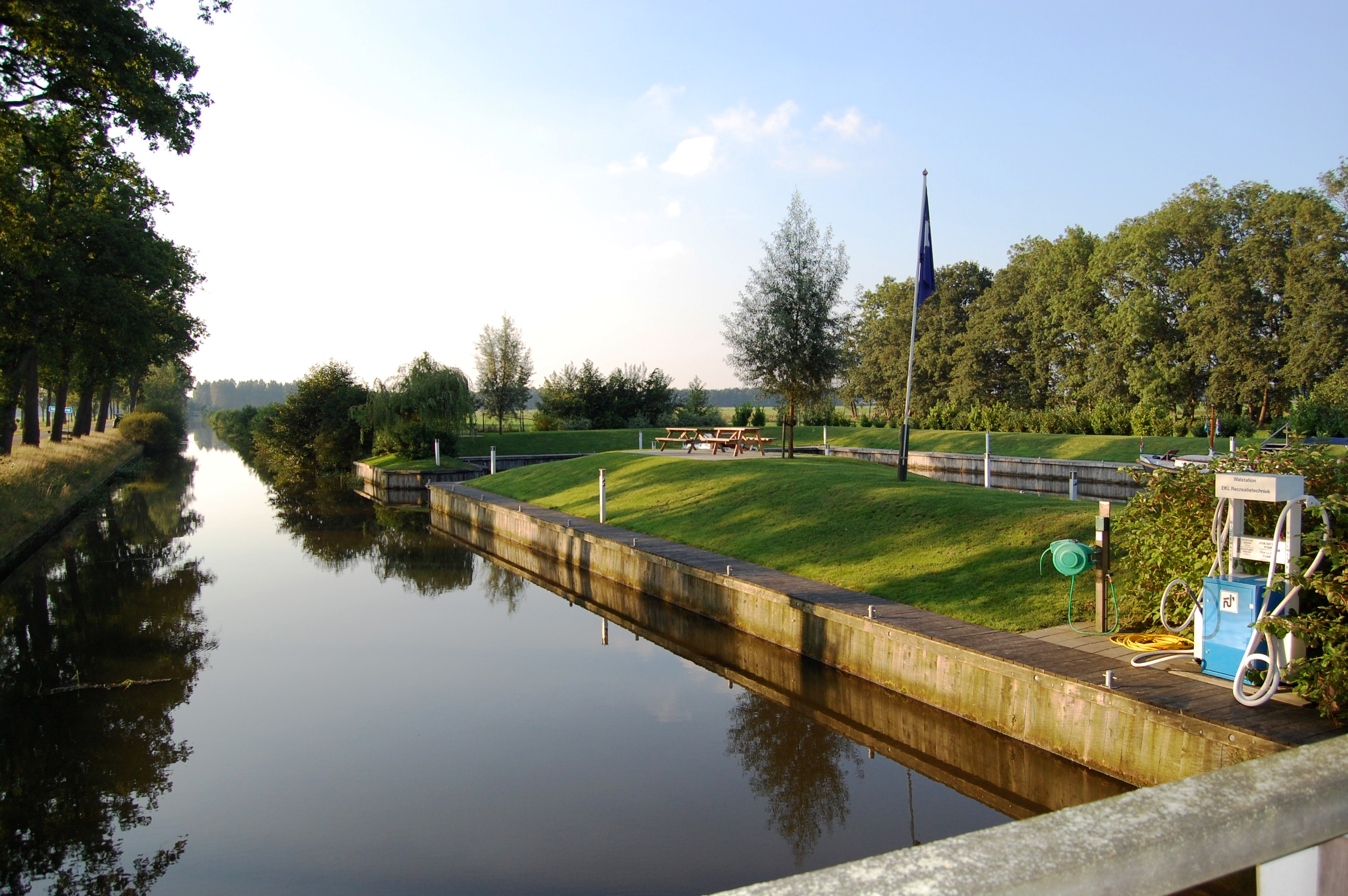 De jachthaven van Oldeberkoop gelegen aan de Prinsenwijk als zij-vaart van het Tjongerkanaal. Naast was- en douchegelegenheid is hier een Sanistation aanwezig voor afvoer van vuilwater.